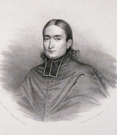 Louis Bautain, Prof. de philosophie à la faculté des lettres de Strasbourg, Chanoine honoraire de la Cathédrale..., Buste, face. Bibliothèque nationale et universitaire de Strasbourg